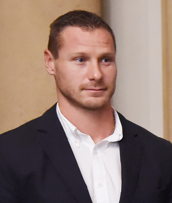 Erik Vlček, december 2015